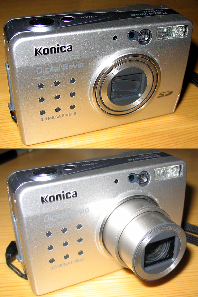 Beschreibung: Typ: Konica:Konica Digital Revio KD-300Z Oberes Bild: ausgeschaltet Unteres Bild: betriebsbereiter Zustand Fotograf/Bearbeitung: Darkone am 27. August 2004 16:45, 28. Aug 2004 Darkone 640 x 960 (312130 Byte)